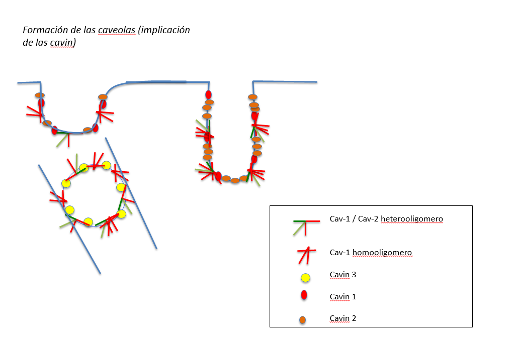 Tipos de proteínas Cavin y su función en las caveolas